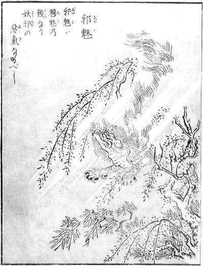 Jami (邪魅) from the Konjaku Gazu Zoku Hyakki (今昔画図続百鬼)